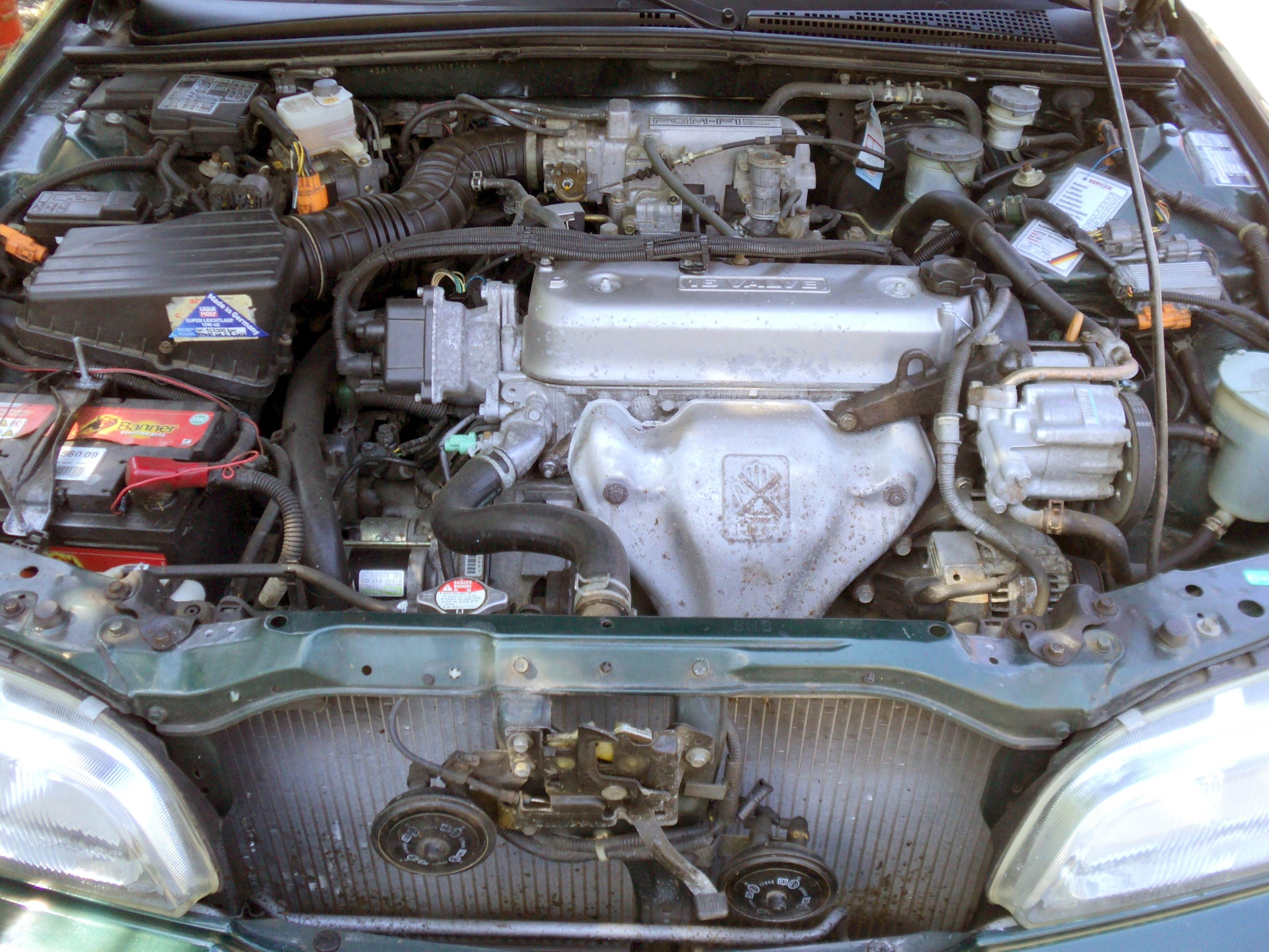 ROVER 620i HONDA 2,0 Petrol engine